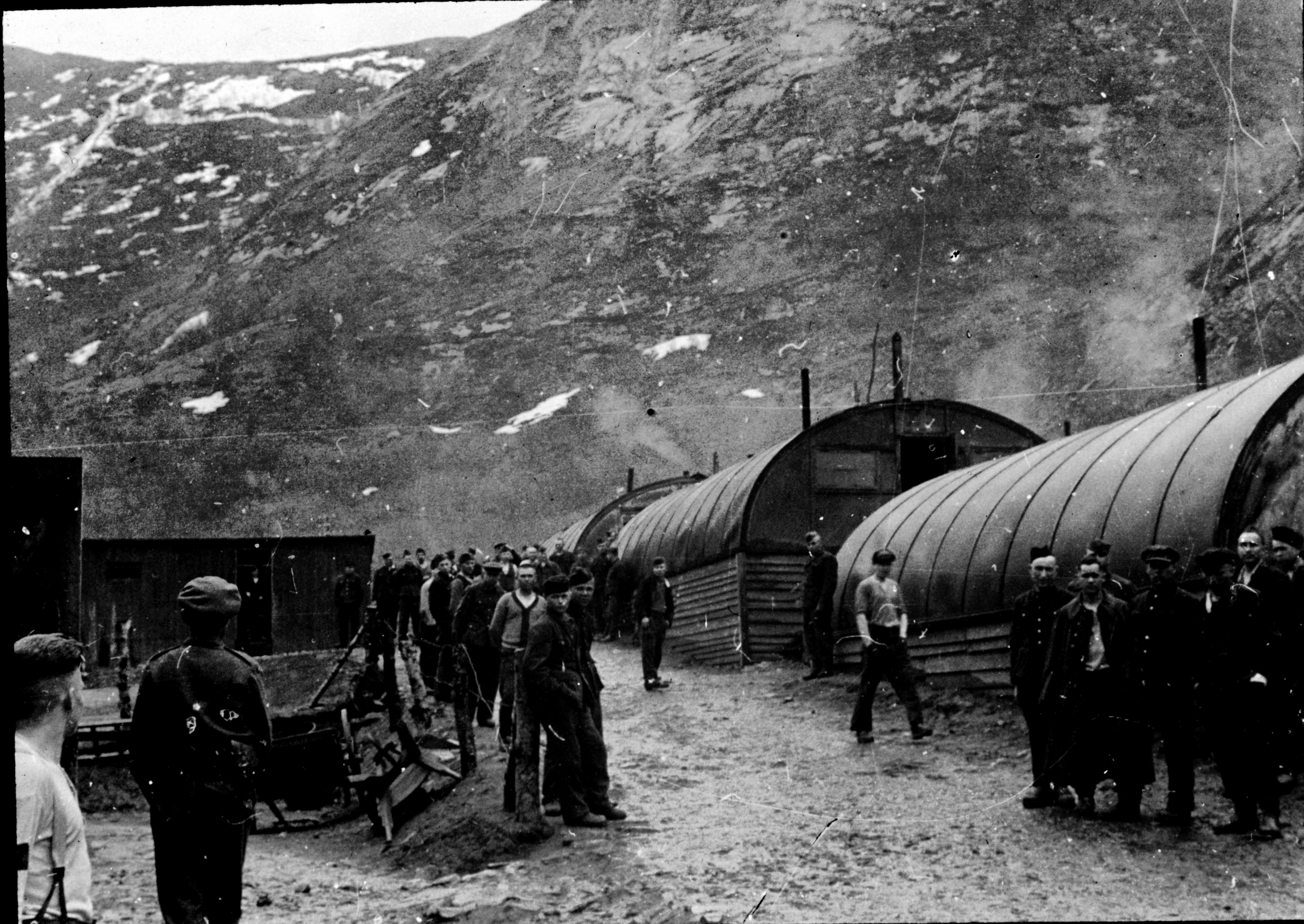 Bildet er hentet fra Arkivverket. Lysbilder fra tyske fangeleire for russere i Norge, 1945. Arkivinstitusjon : Riksarkivet Arkivnavn : Kreyberg, Leiv Sted : NORGE, Nordland, Salten, Emneord: Andre verdenskrig, Krig, Frigjøring Avbildet